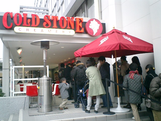 コールド・ストーン・クリーマリー六本木ヒルズ店